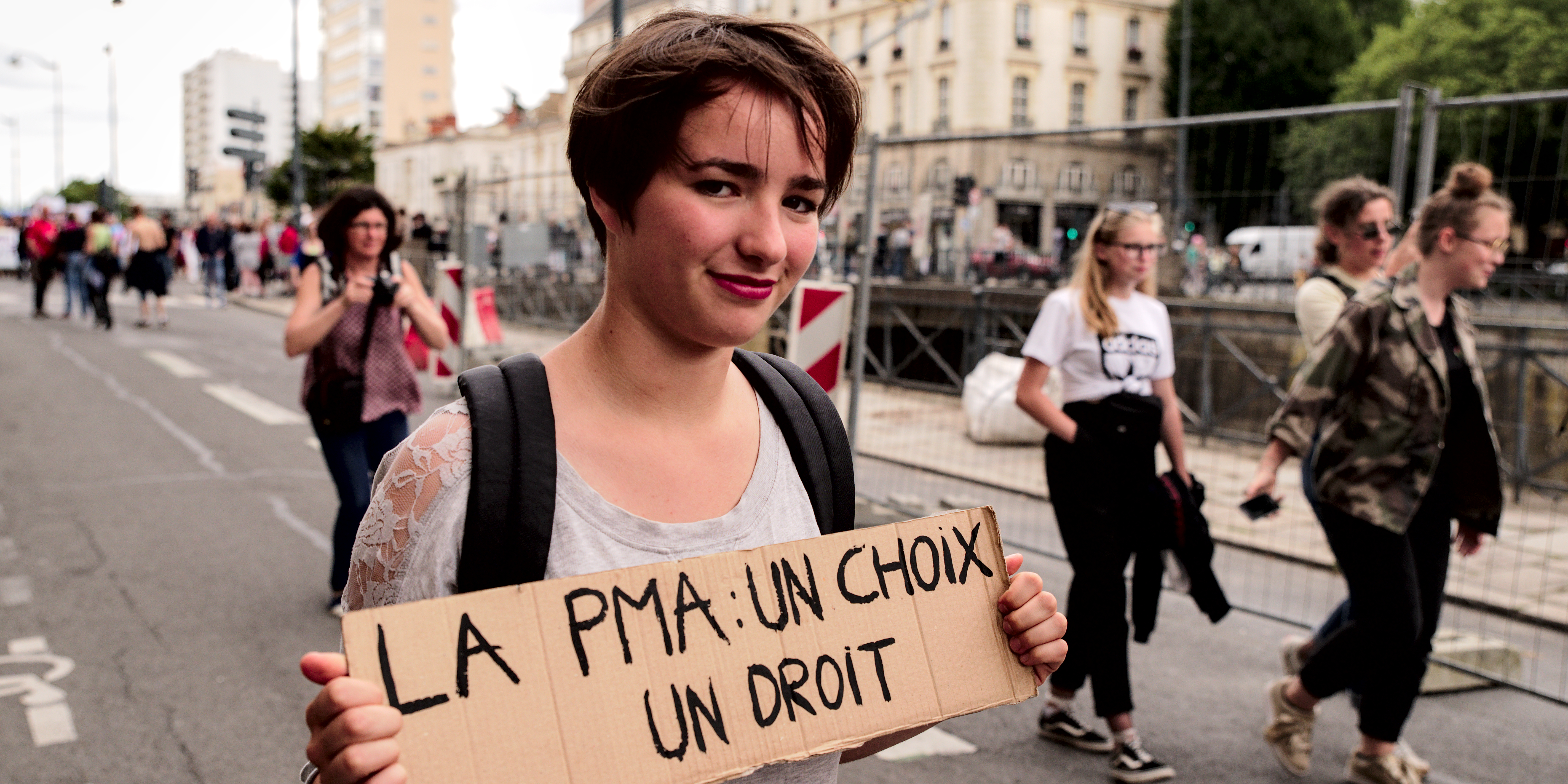 Rennes - Marche des fiertés 2018